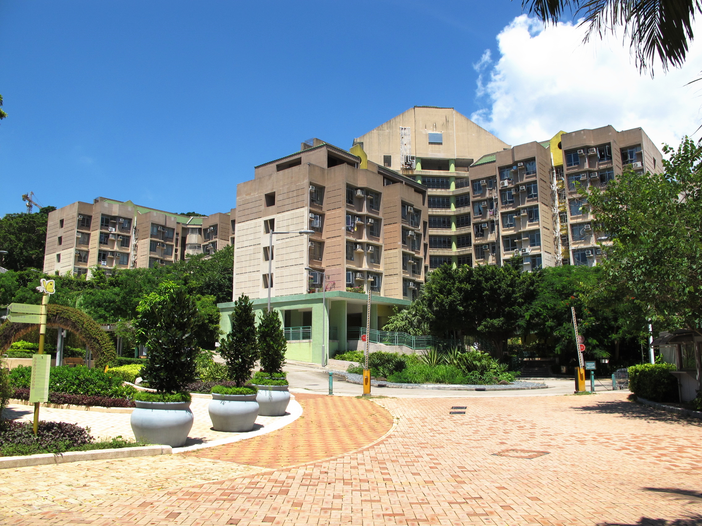 Lung Tak Court